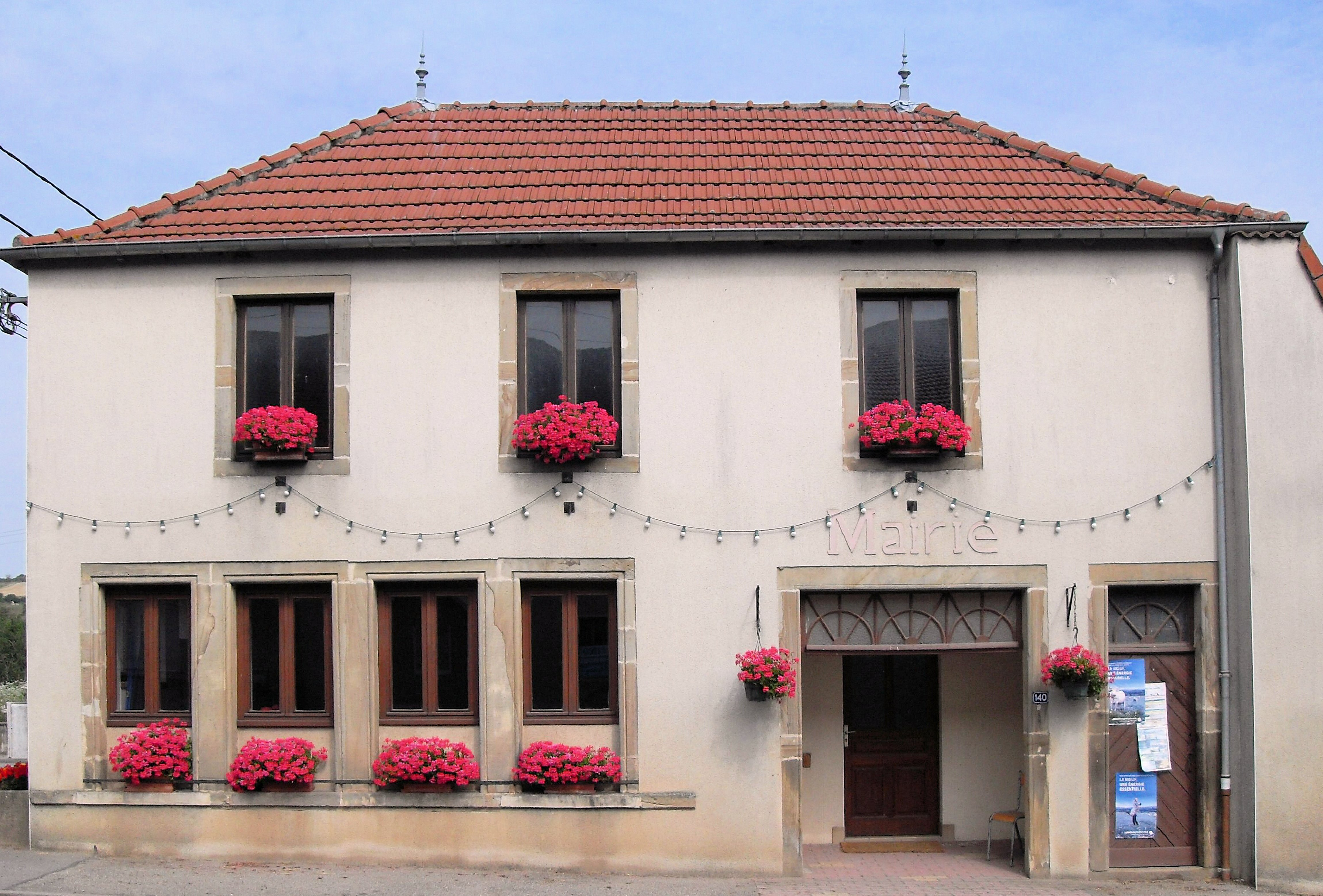 La mairie de Bettoncourt